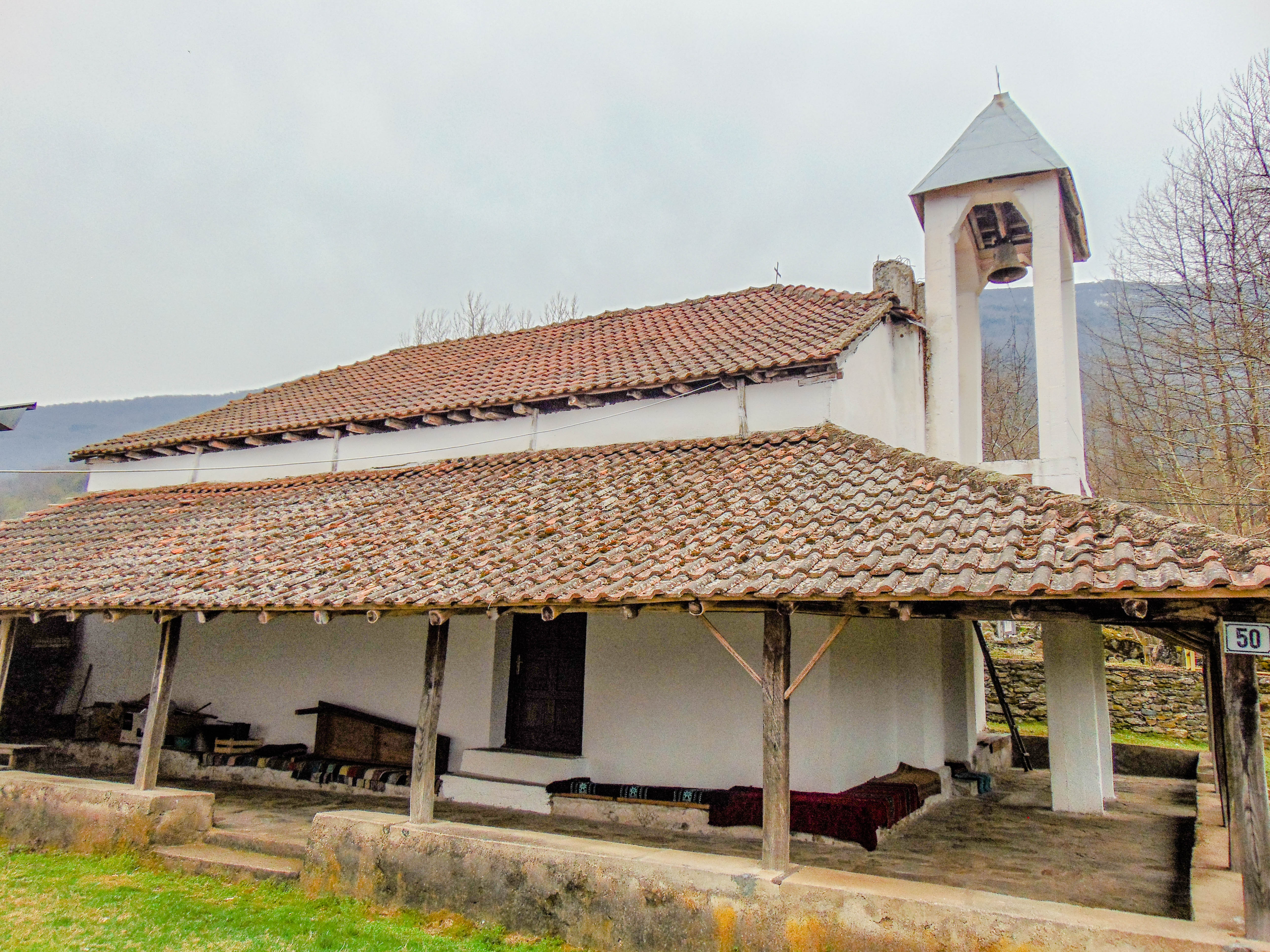 Црква „Рождество на Пресвета Богородица“ - Дражево